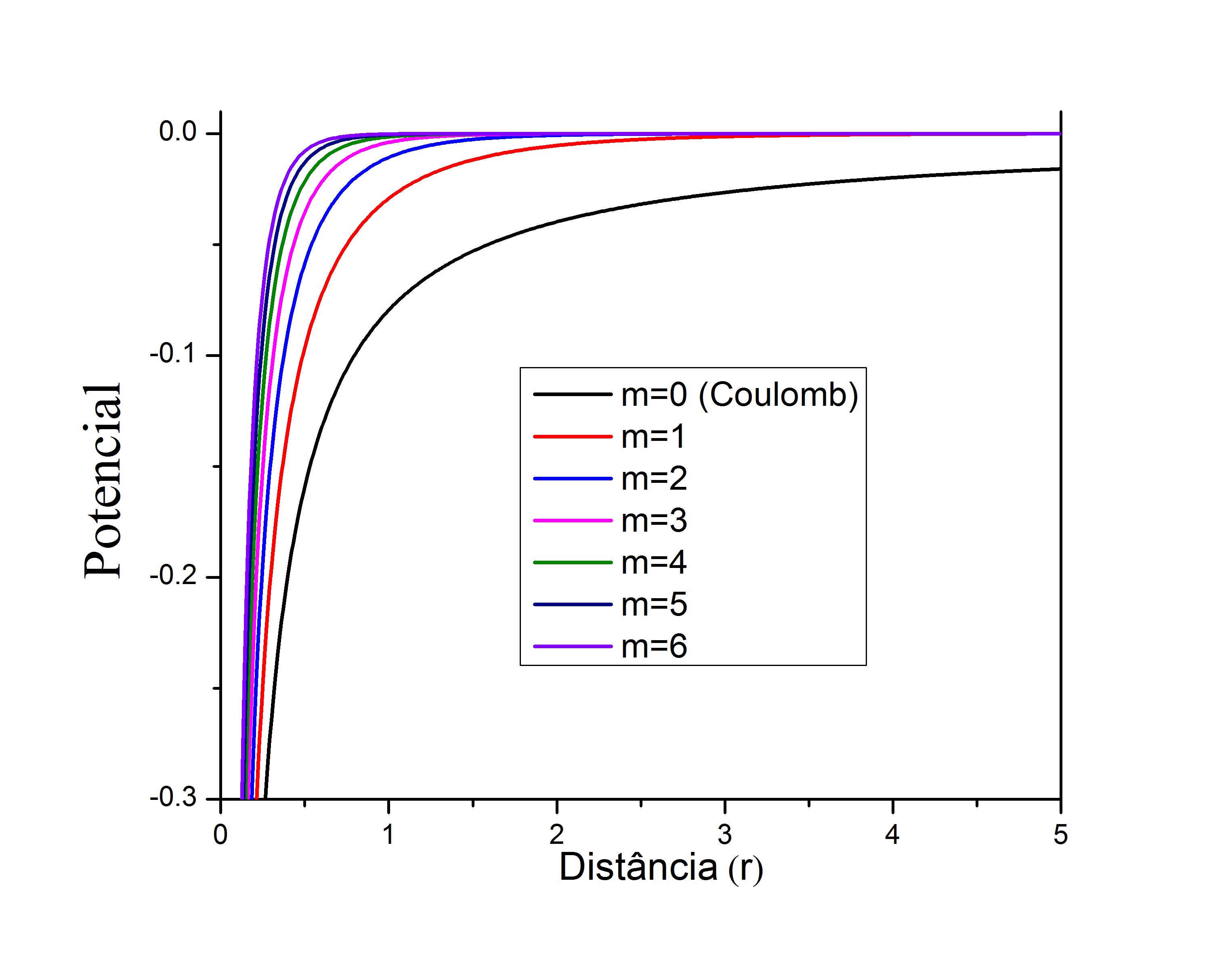 Gráfico do potencial de Yukawa V ( r ) {\displaystyle V(r)} para escolhas distintas da massa m. Aqui consideramos o sistema de unidades de medida onde c = 1 {\displaystyle c=1} e adotamos g s = 1 {\displaystyle g_{s}=1} , apenas como ilustração do comportamento de V ( r ) {\displaystyle V(r)} com r {\displaystyle r} e m {\displaystyle m} .